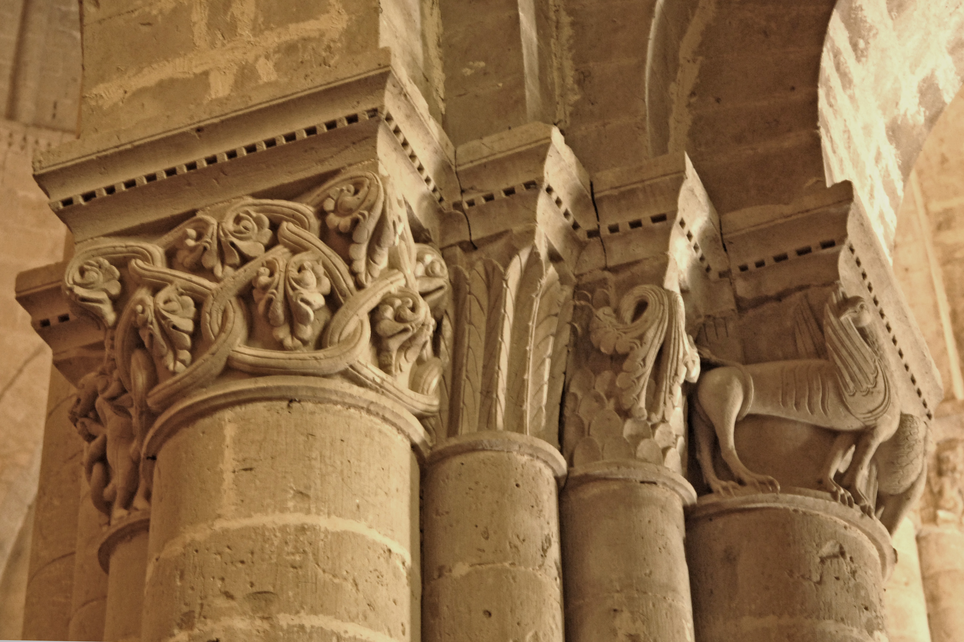 St.-Pierre Aulnay,Kapitelle Vierungspfeiler